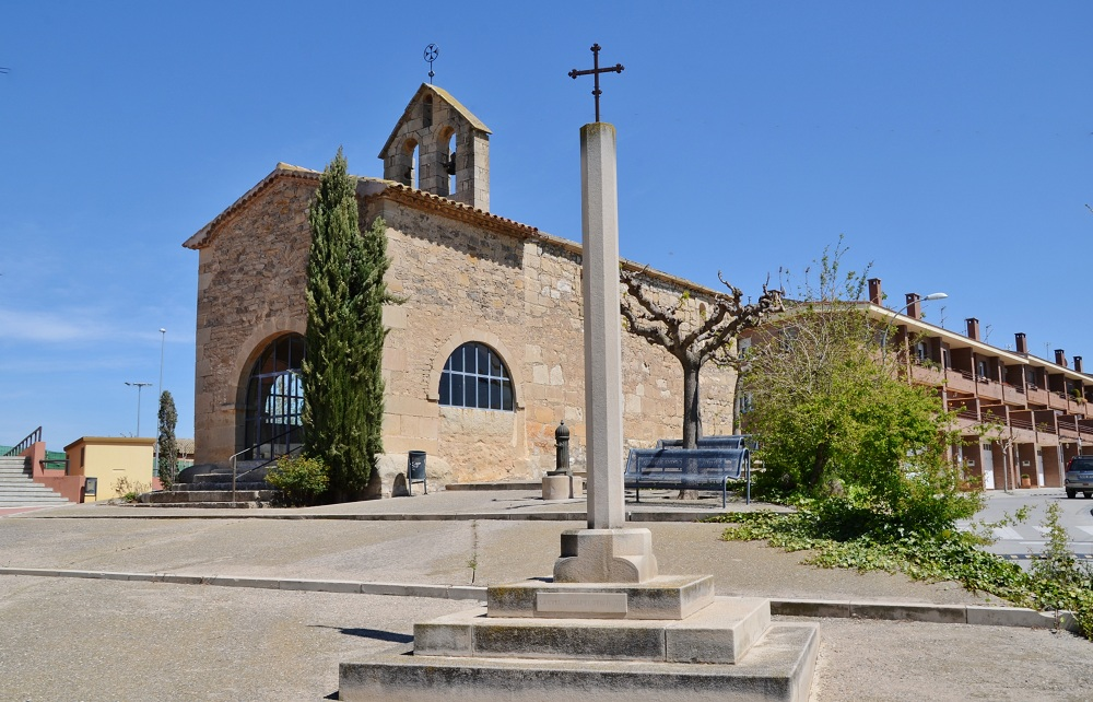 Ermita de la Mare de Déu del Roser (Vilagrassa)